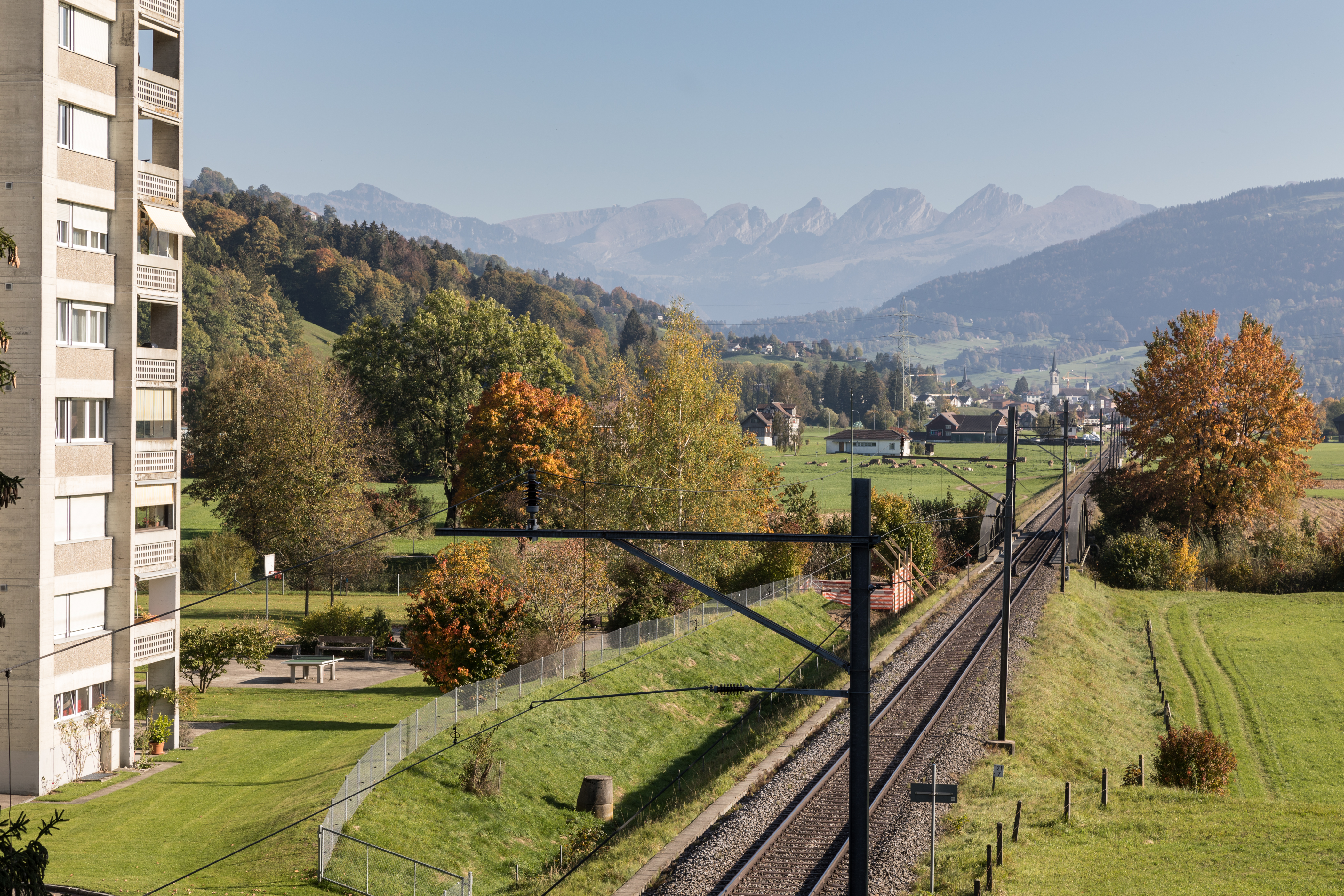 Bahnlinie zwischen Wattwil und Ebnat-Kappel, im Hintergrund die Churfirsten